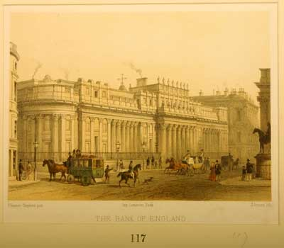 Банка на Англија 19-ти век